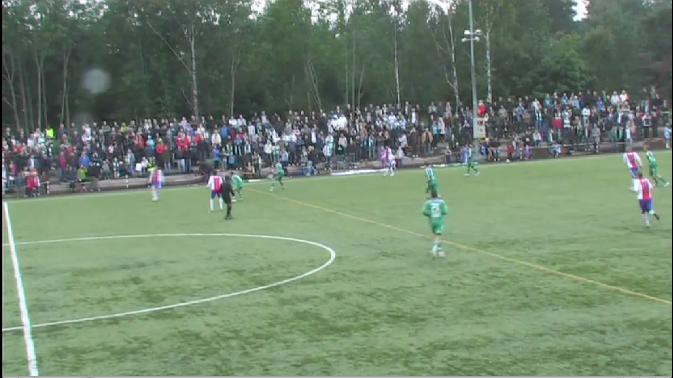 Bilde fra KFUM-Hamarkameratene 0-0 (11. september. 2010)